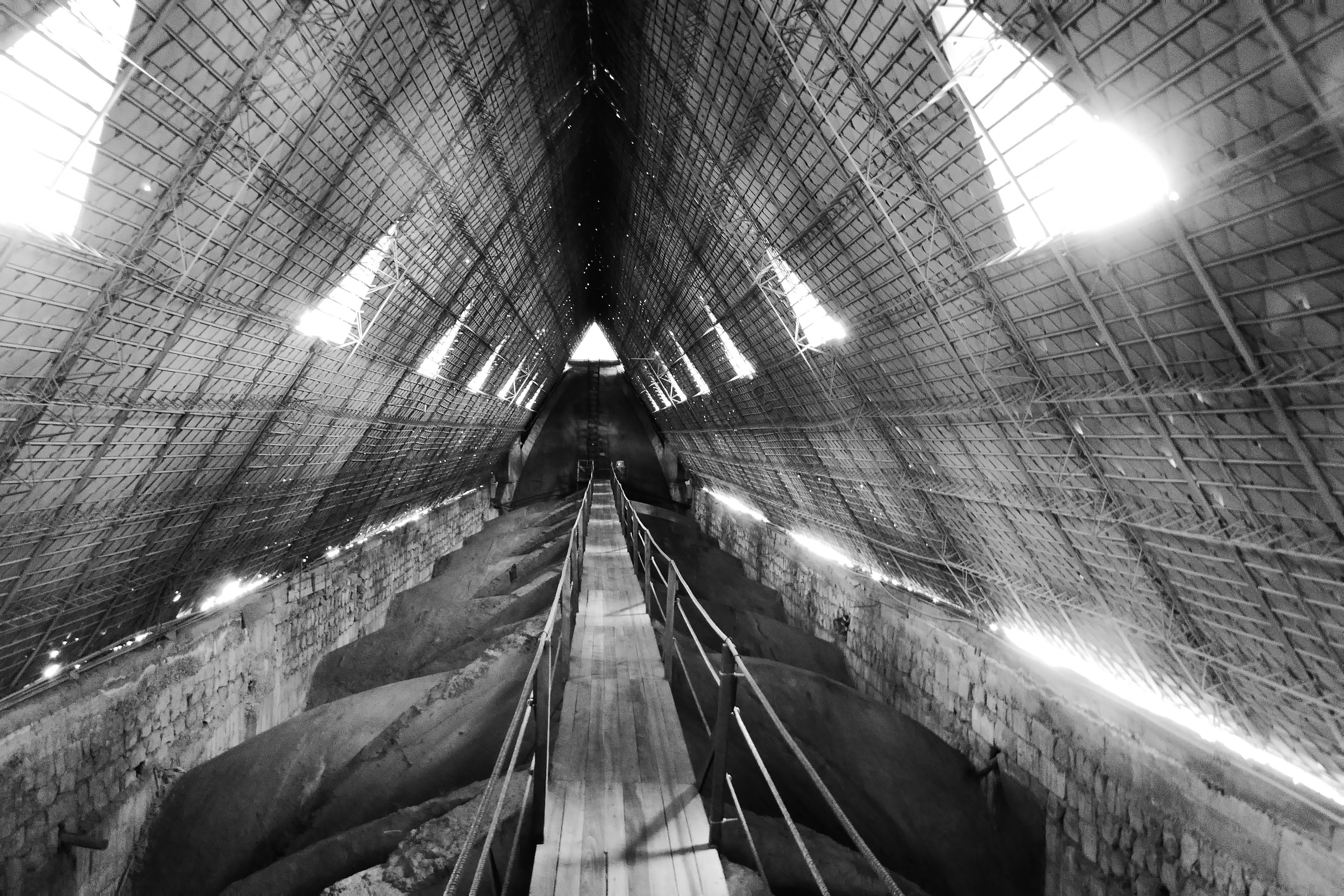 Auf dem Weg in den Vierungsturm über das Dach des Langhauses der Basílica del Voto Nacional